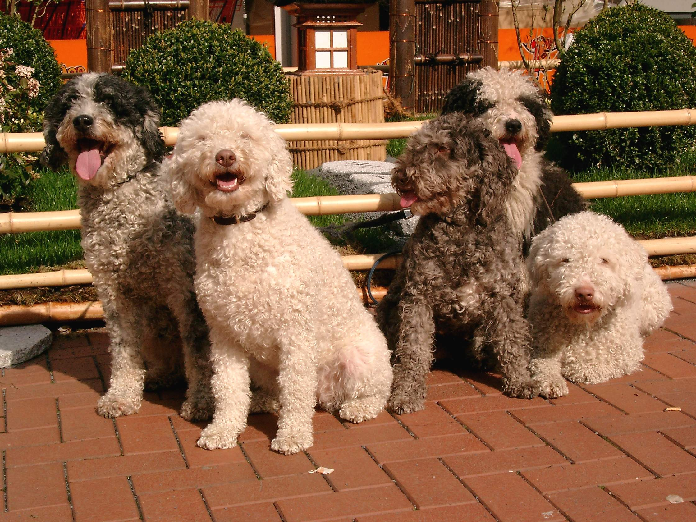 Perro de Aguas, Autor:Susanne Lorenz, eigenes Werk, aufgenommen Ostern 2006.